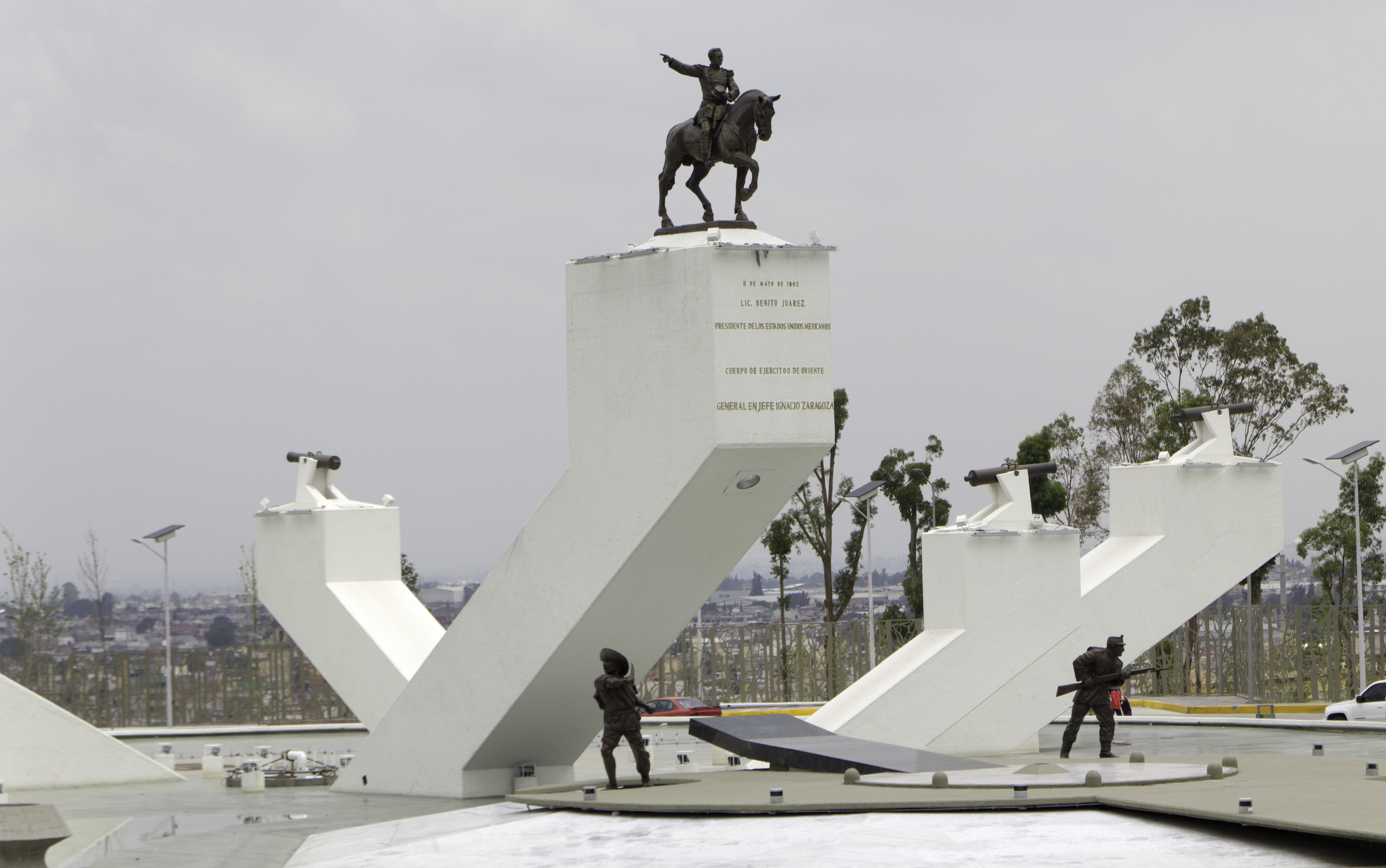 Monumento al General Ignacio Zaragoza en el Cerro de los Fuertes de Loreto y Guadalupe en Puebla